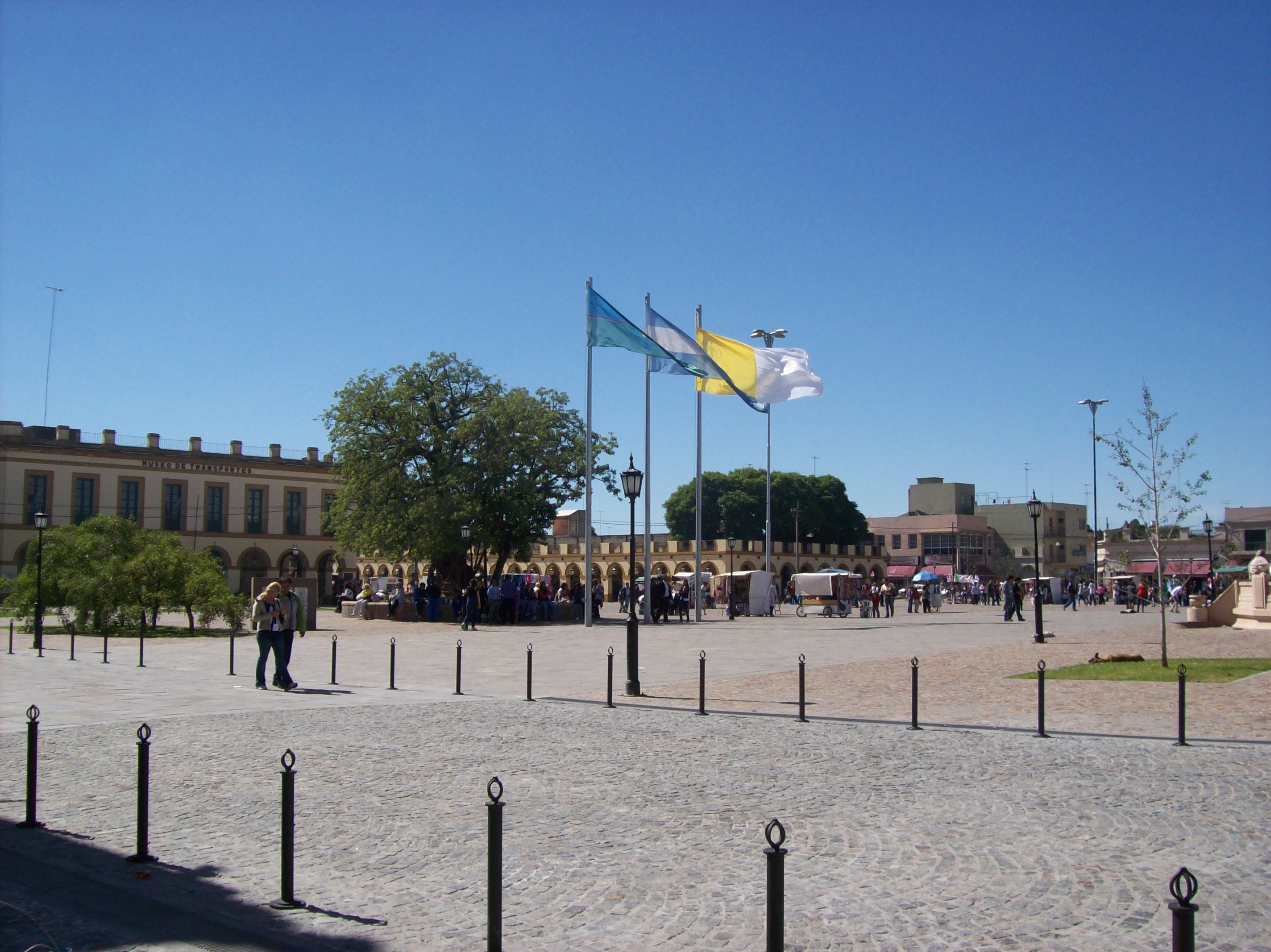 Banderas en la Plaza Belgrano en la ciudad de Luján, provincia de Buenos Aires, Argentina. Las banderas izadas son la provincial, la nacional y la del Vaticano.